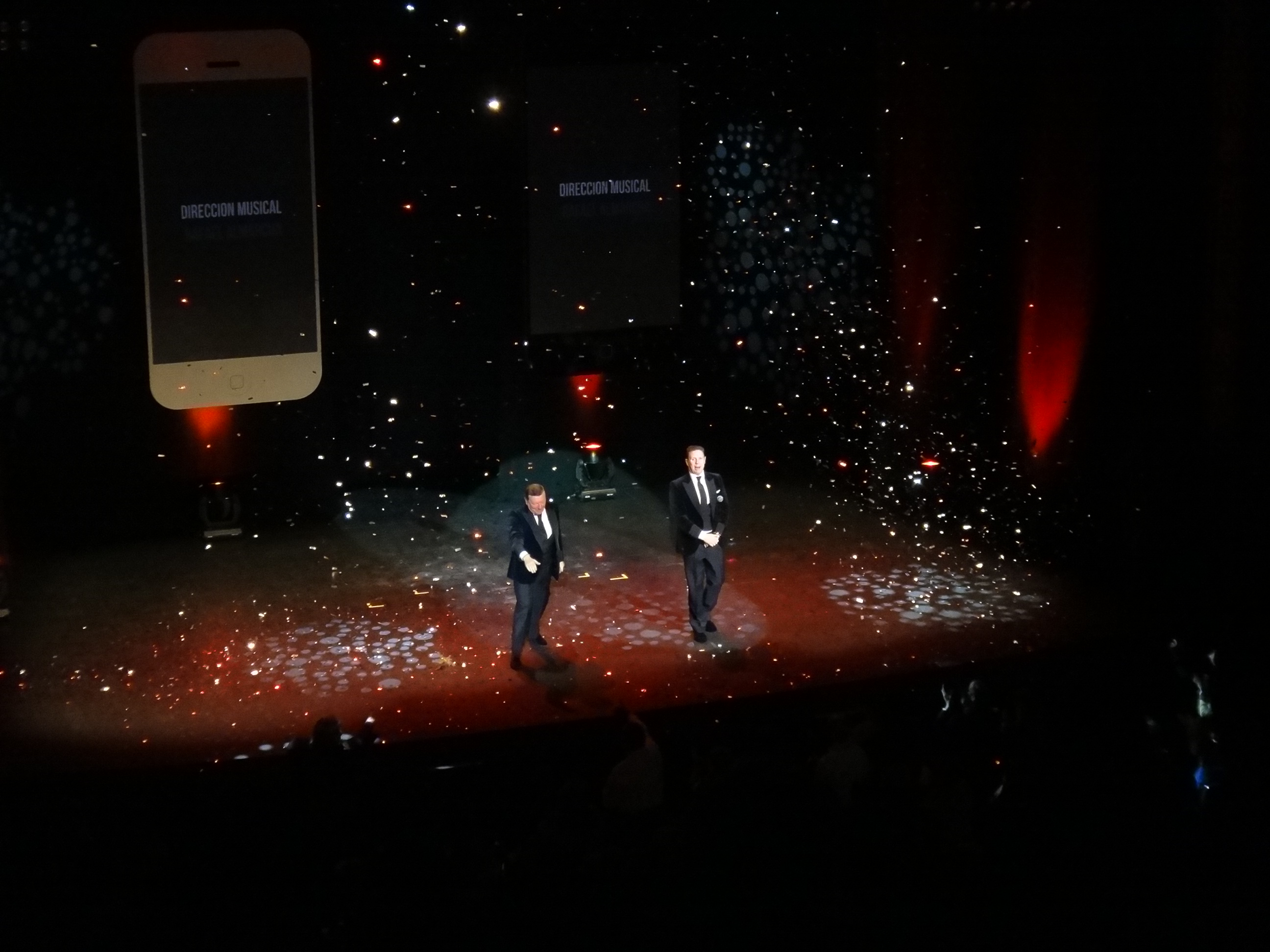 Espectáculo de los Morancos "En positivo" en el Teatro Villamarta de Jerez de la Frontera (Andalucía, España)